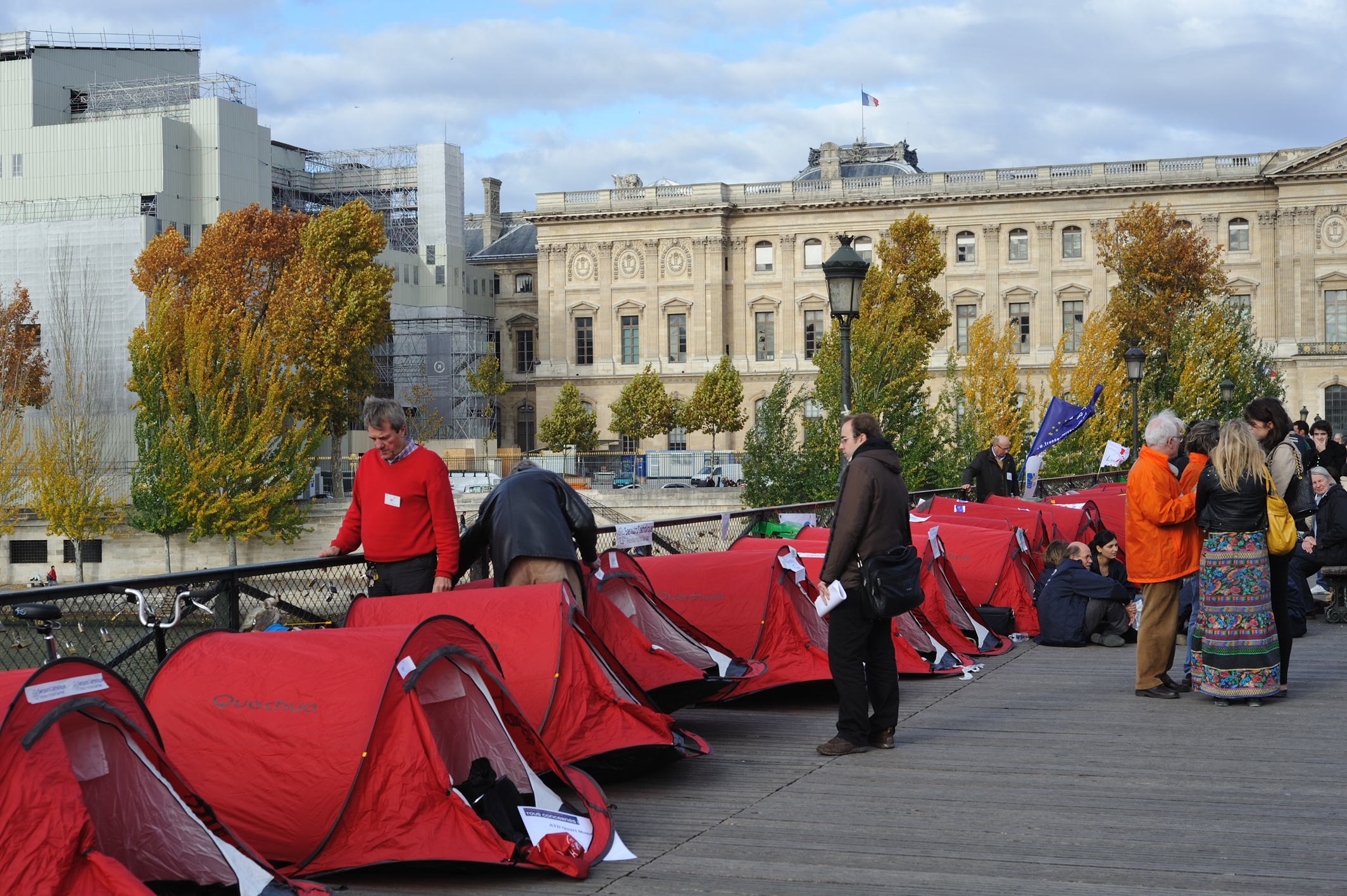 Camp de soutien aux mal-logés organisé le 5 novembre 2010 sur le pont des Arts, Paris, France